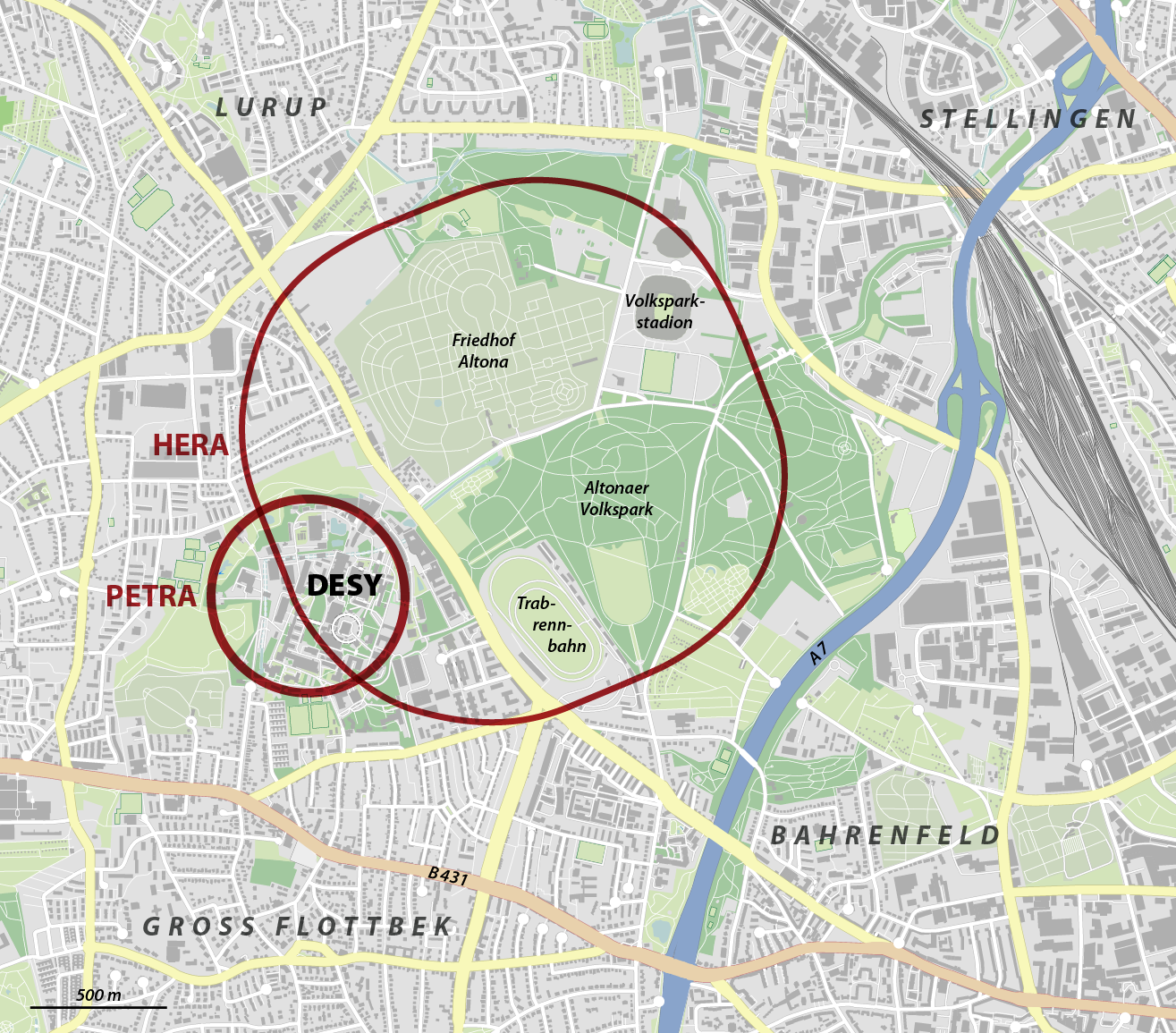 Karte der Ringbeschleuniger PETRA und HERA des Deutschen Elektronen-Synchtrotons (DESY) in Hamburg